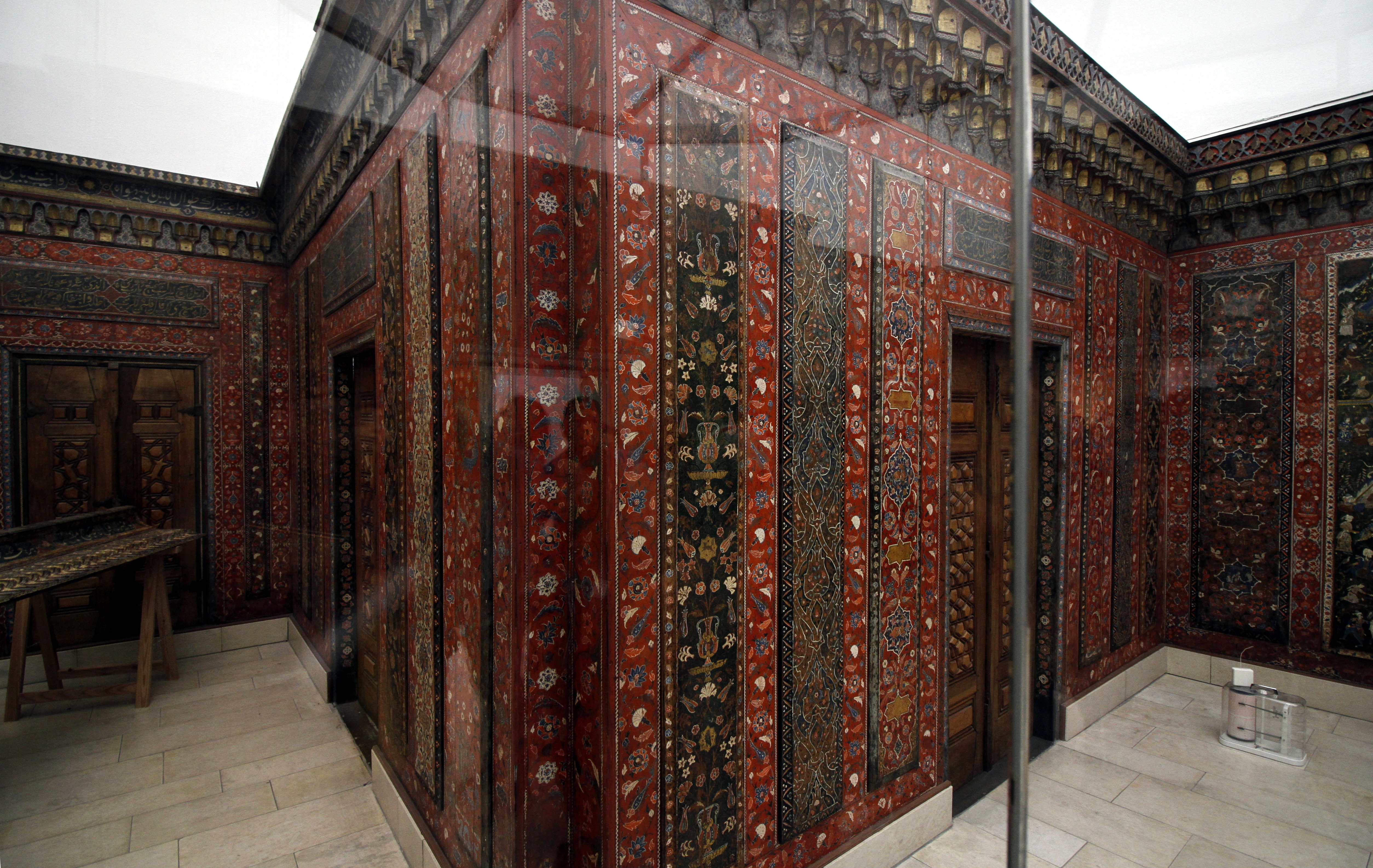 Aleppo Room - Pergamonmuseum - Berlin - Germany